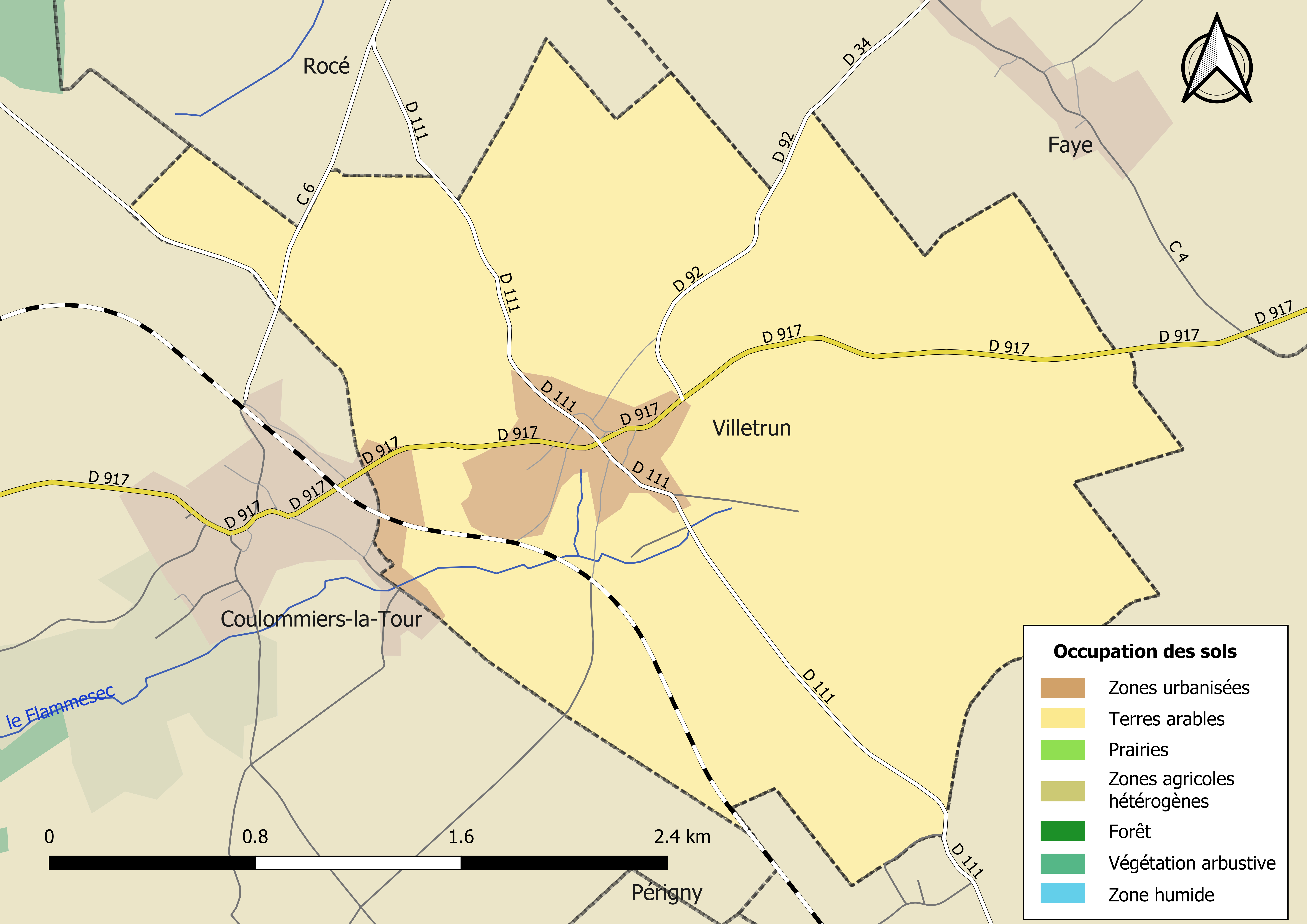 Carte des infrastructures et de l’occupation des sols en 2018 de la commune de Villetrun (France).